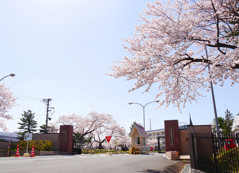 弘前駐屯地は、その美しい桜でも知られている